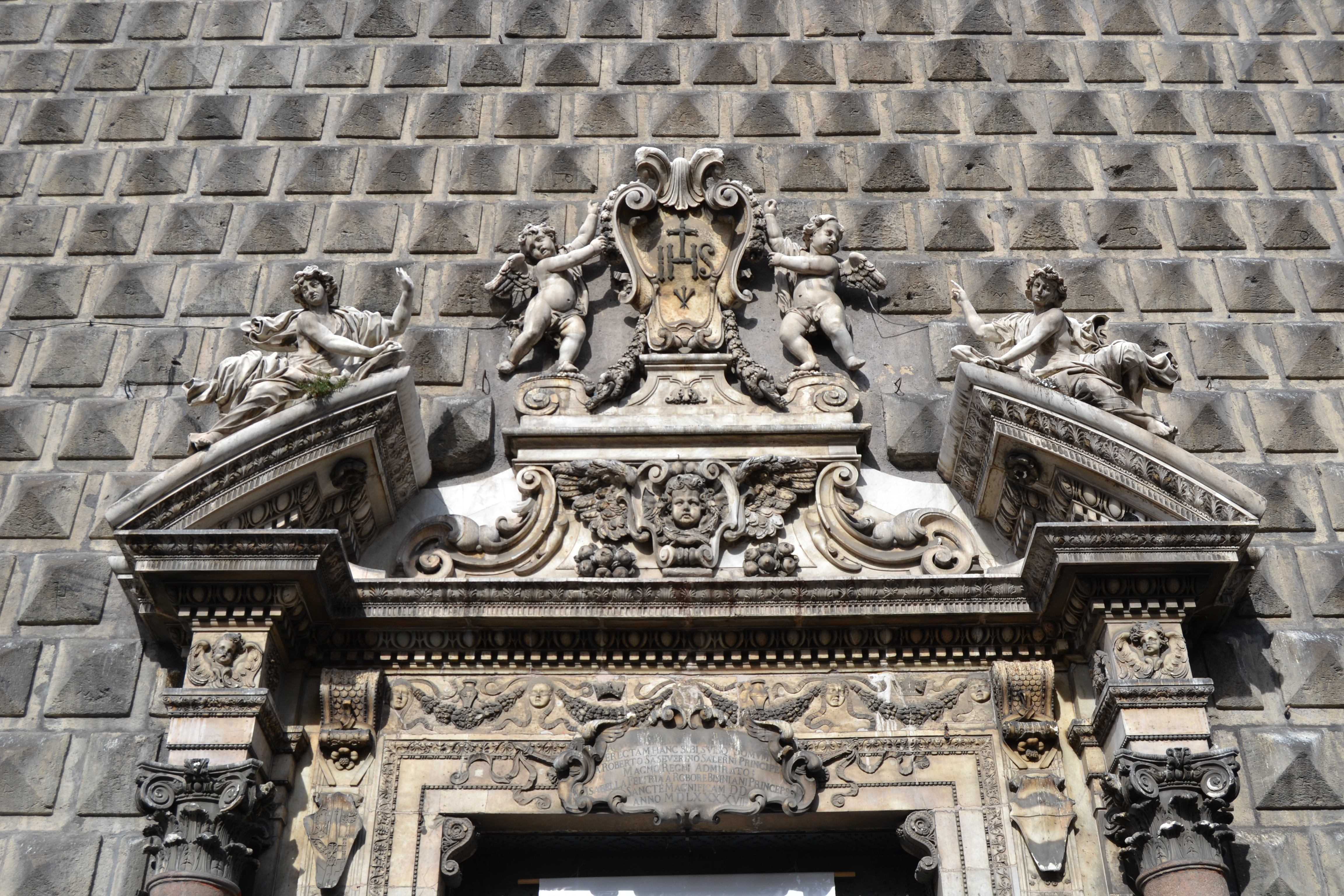 Chiesa del Gesù Nuovo di Napoli. Particolare portone d'ingresso